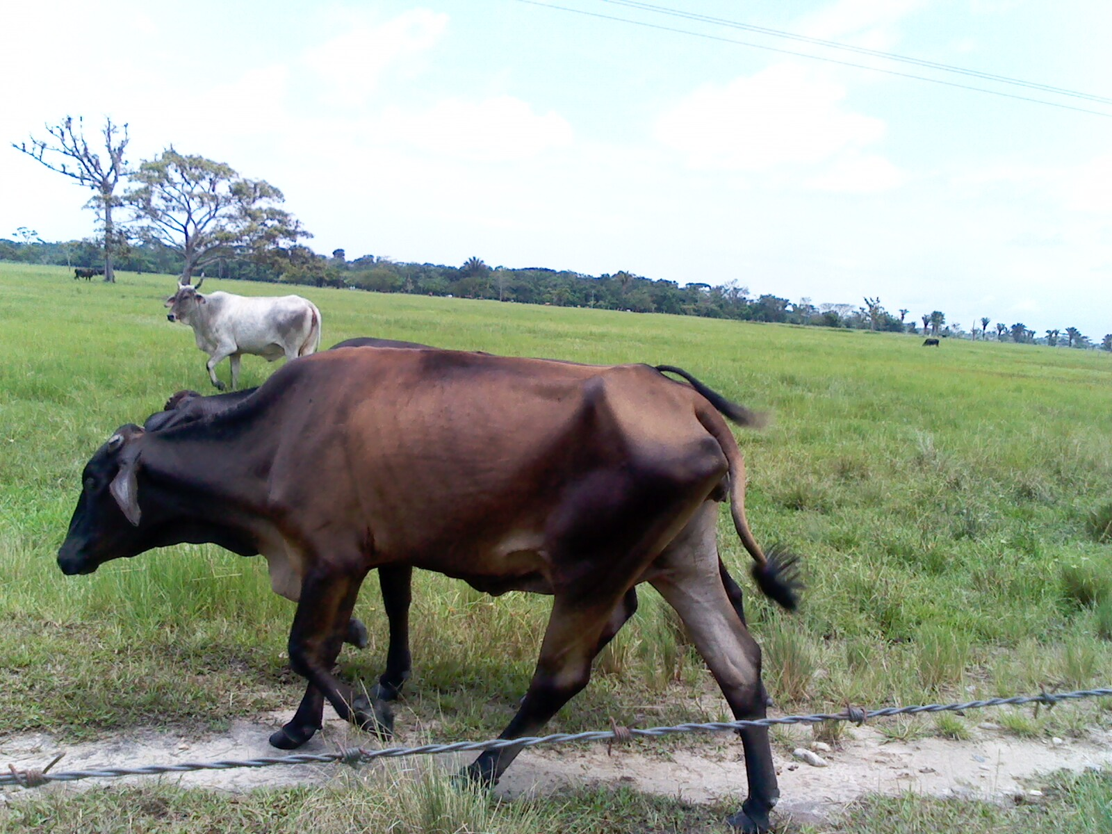 Ganado Bovino